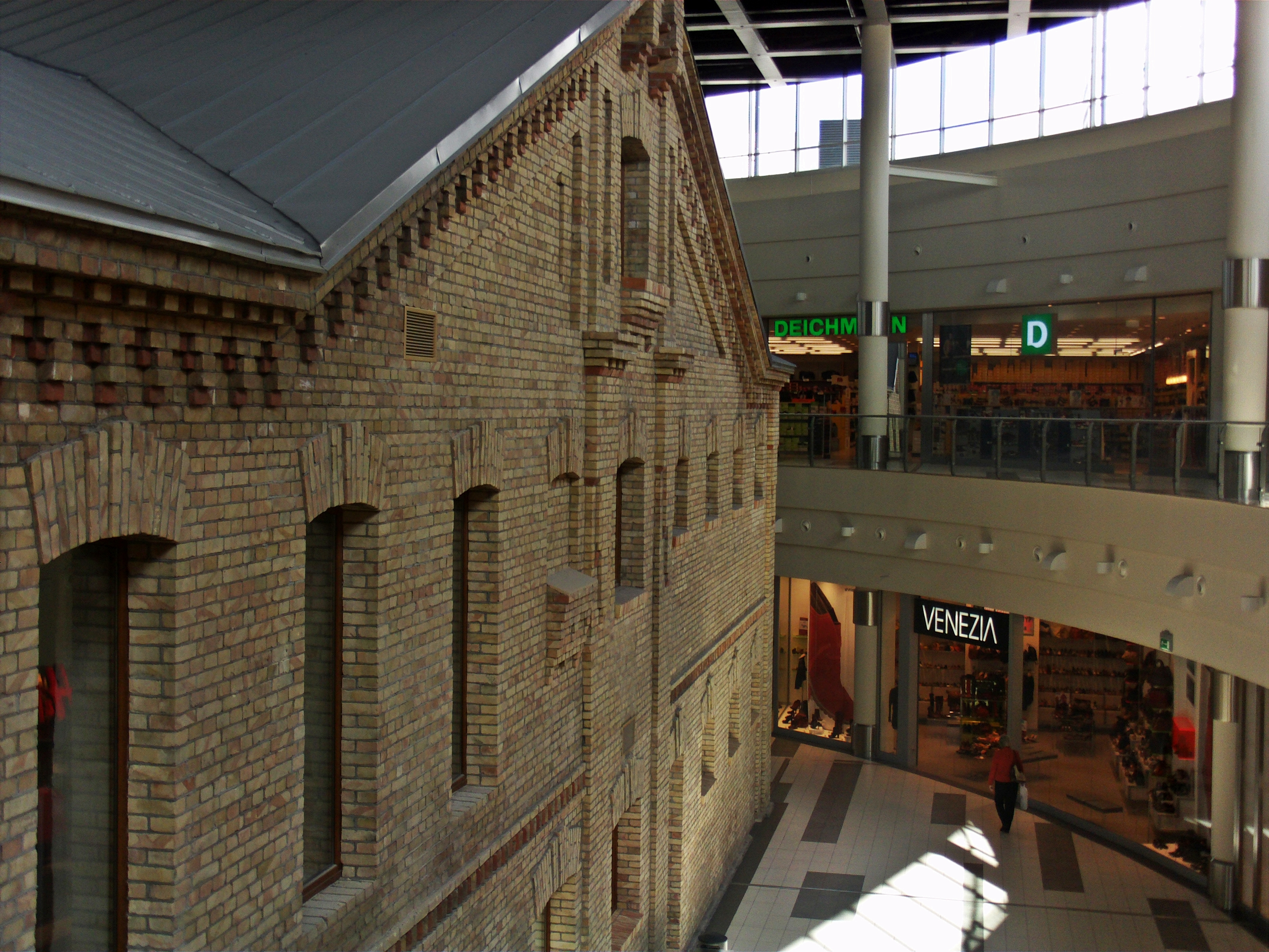 Suwałki, ul. Dwernickiego 17 - zespół dawnych budynków więziennych, wkomponowany w galerię handlową Plaza (zabytek nr A-181 z 4.02.2008)